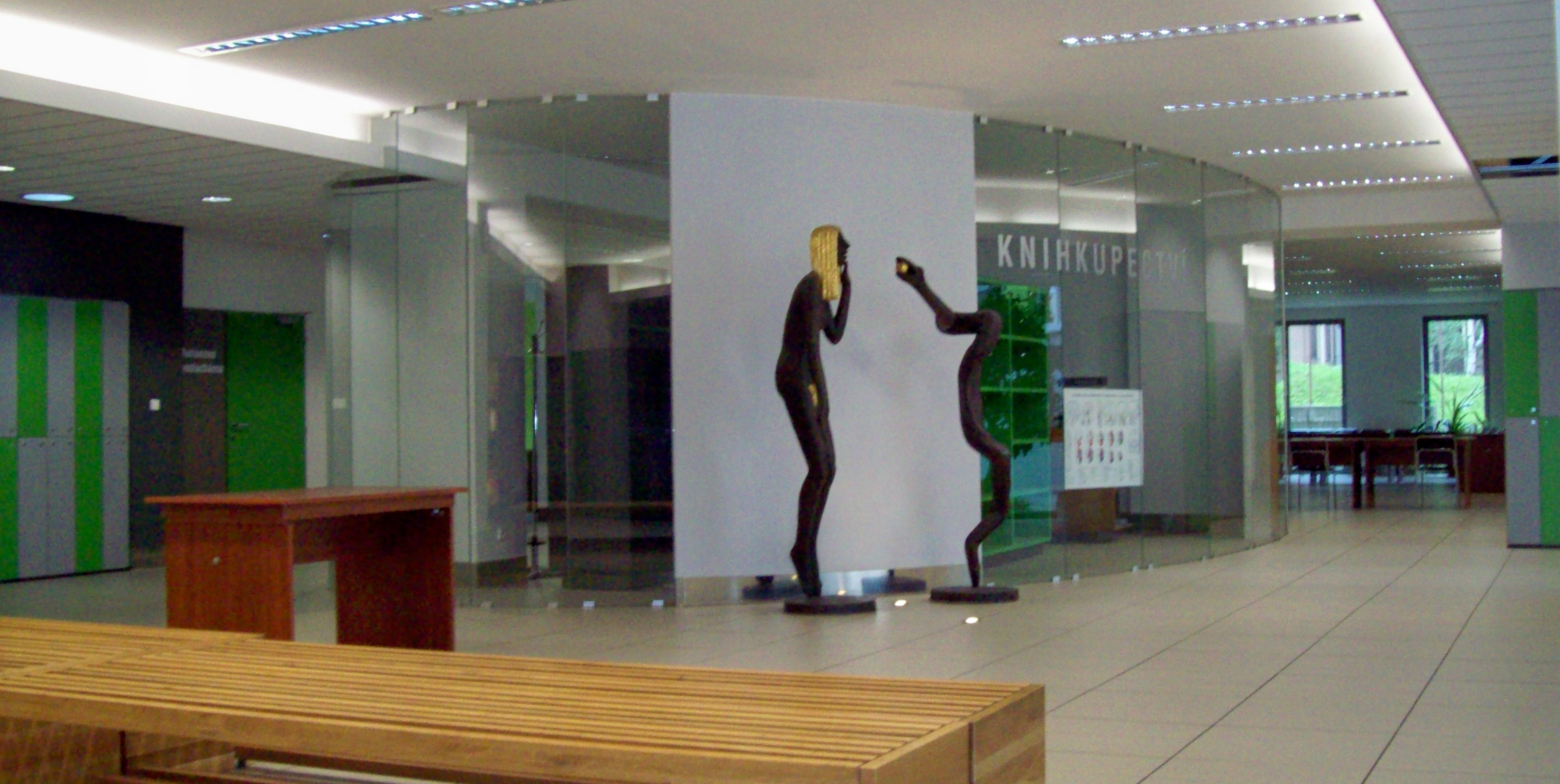 Atrium - budova 3. lékařské fakulty Univerzity Karlovy v Praze, ulice Ruská 87, Praha 10. Plastika "Eva" Olbrama Zoubka a knihkupectví.